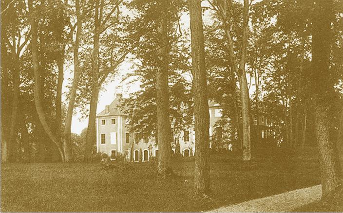 Postkarte von Schloss Reichertswalde (Ostpreußen), 1910 gelaufen